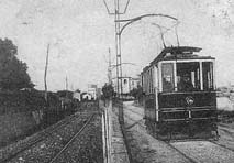 Tranvia Anzio-Nettuno. A sinistra il binario della ferrovia Albano-Nettuno.